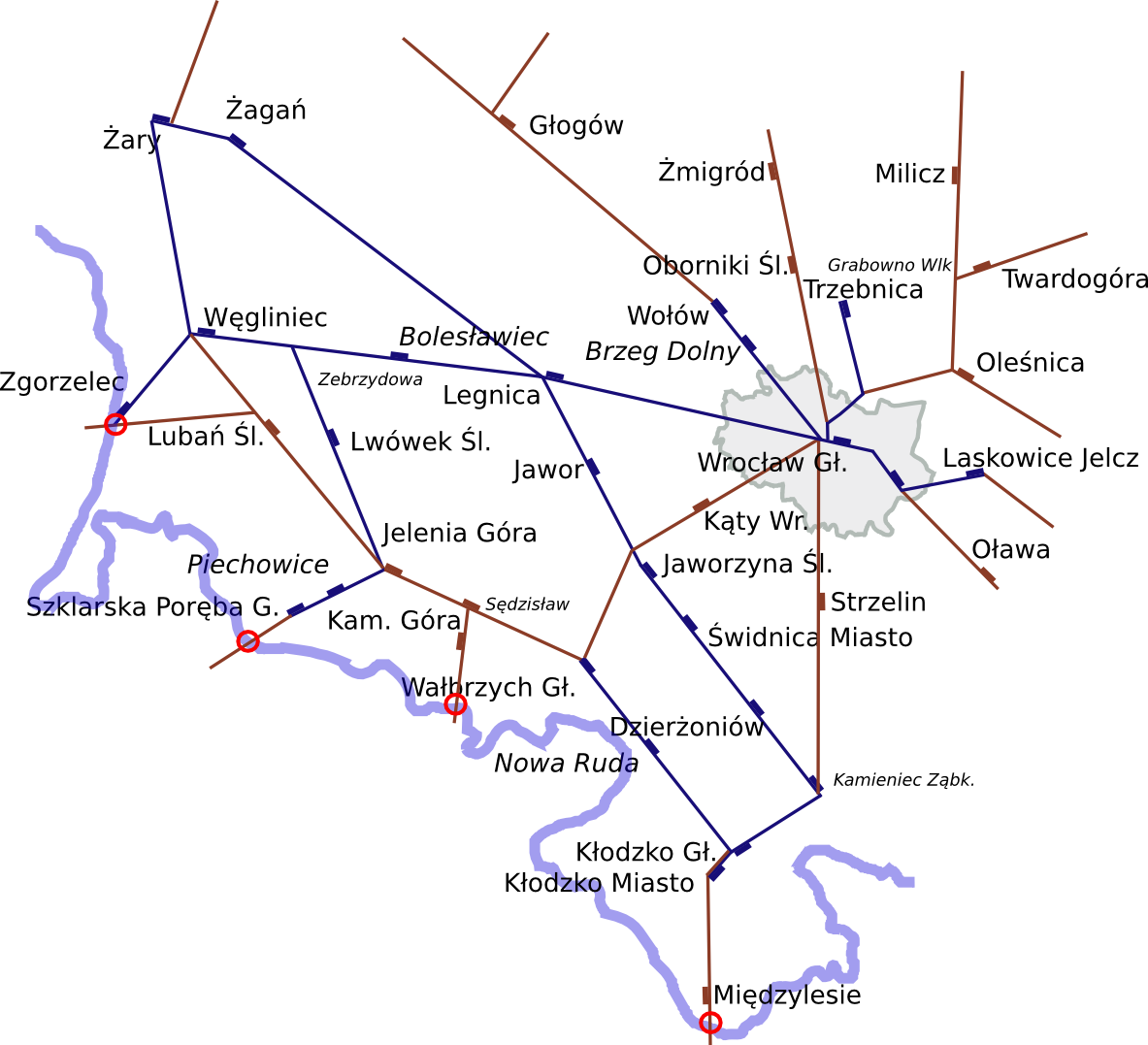 Żródło